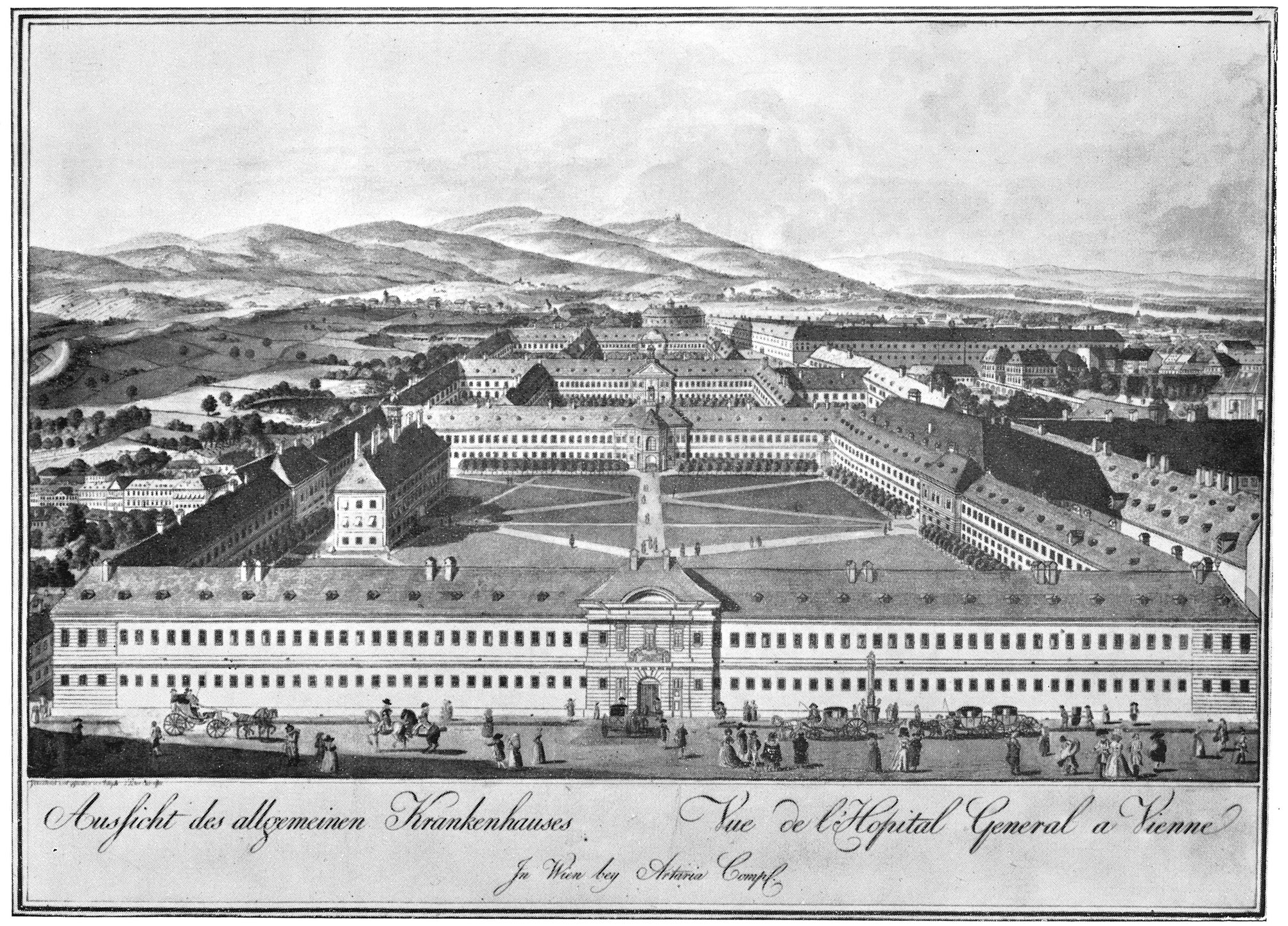 Altes AKH in Wien, Kolorierter Stich von 1784